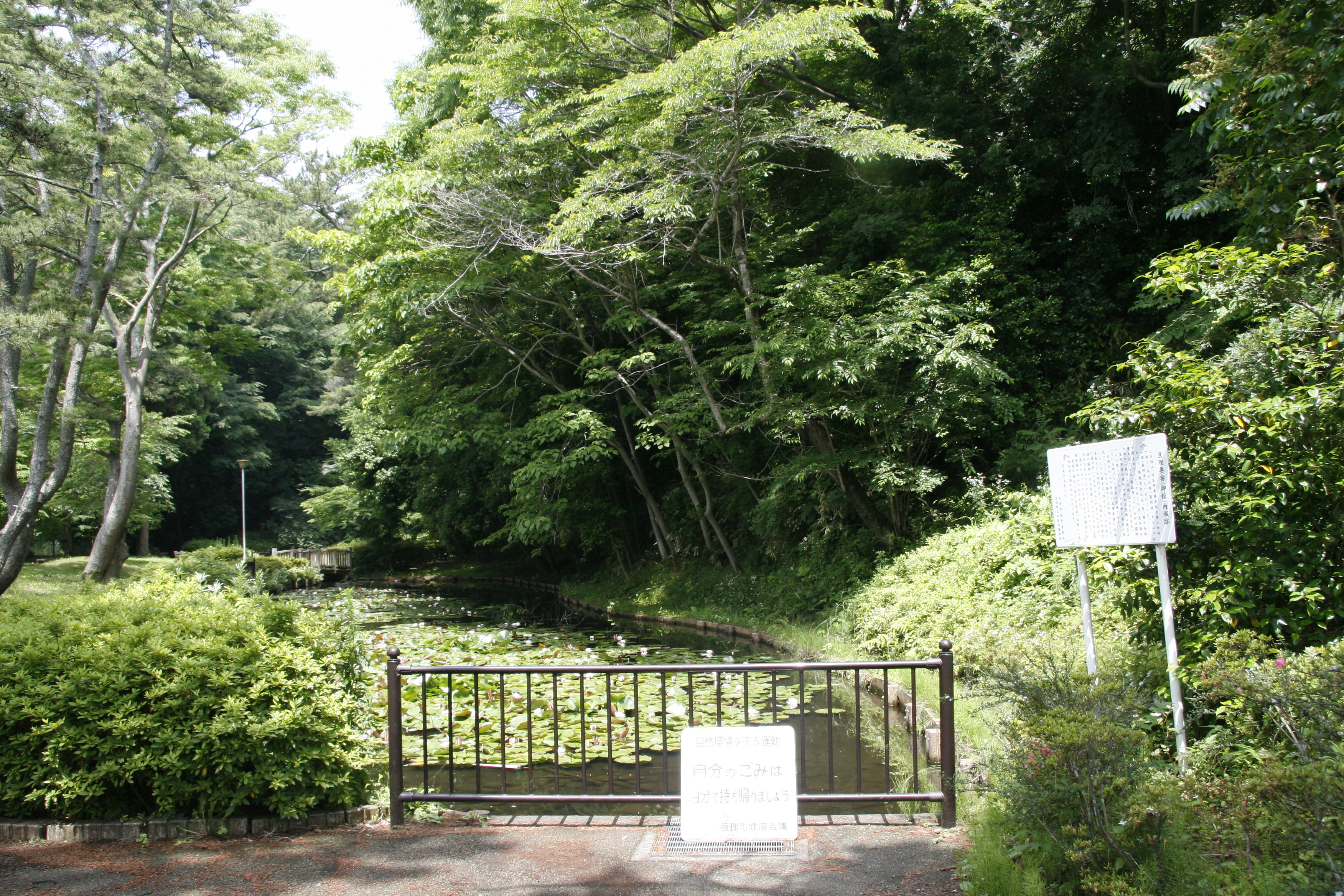 亘理城の堀跡